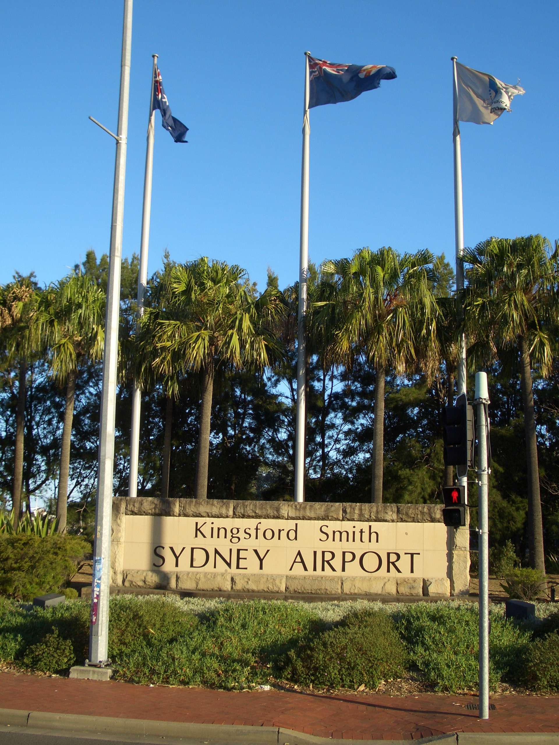 Lối vào nhà ga Nội địa Sân bay Sydney